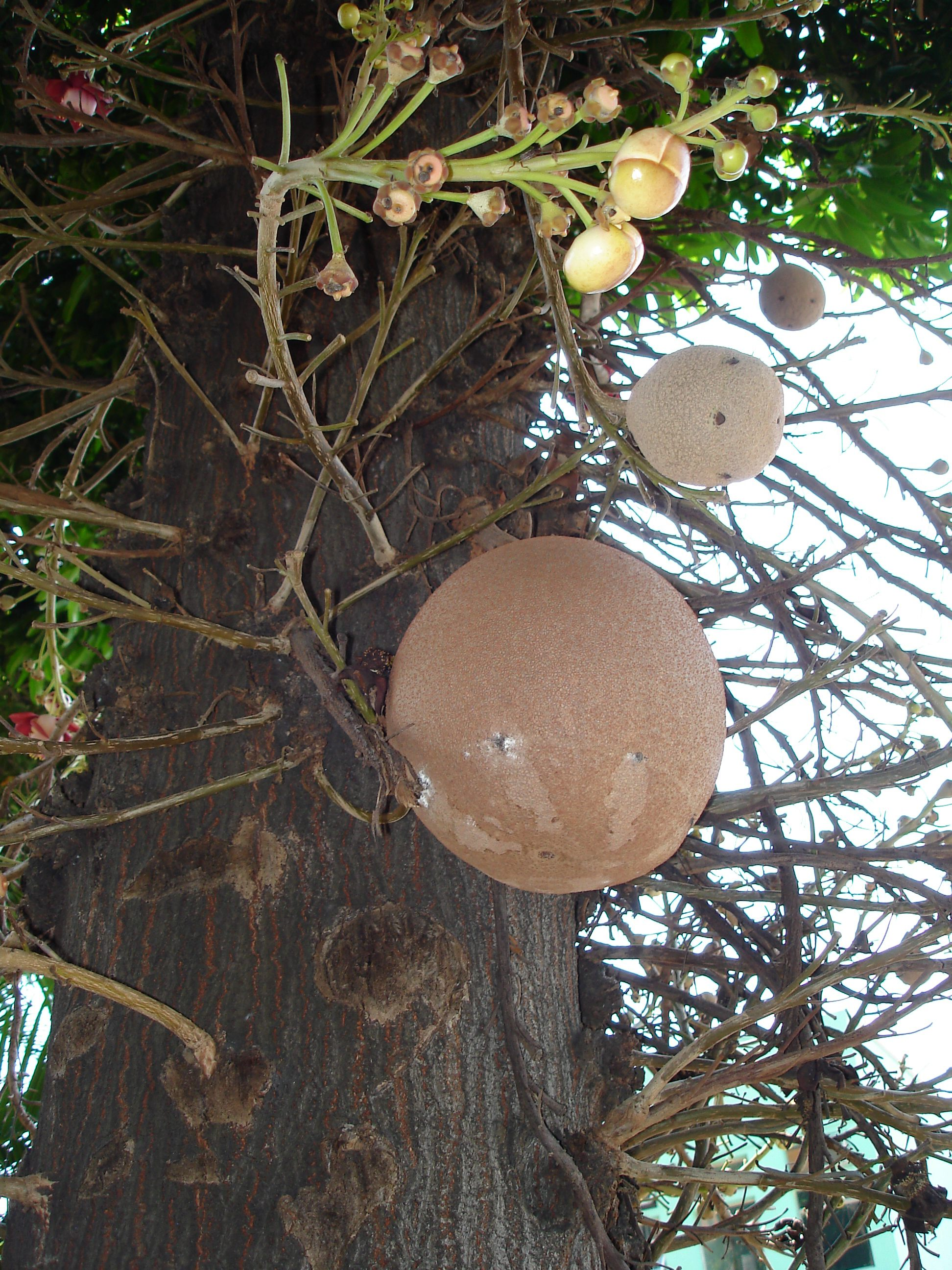 Fruit of Courupita guianensis (Abricó de macaco)